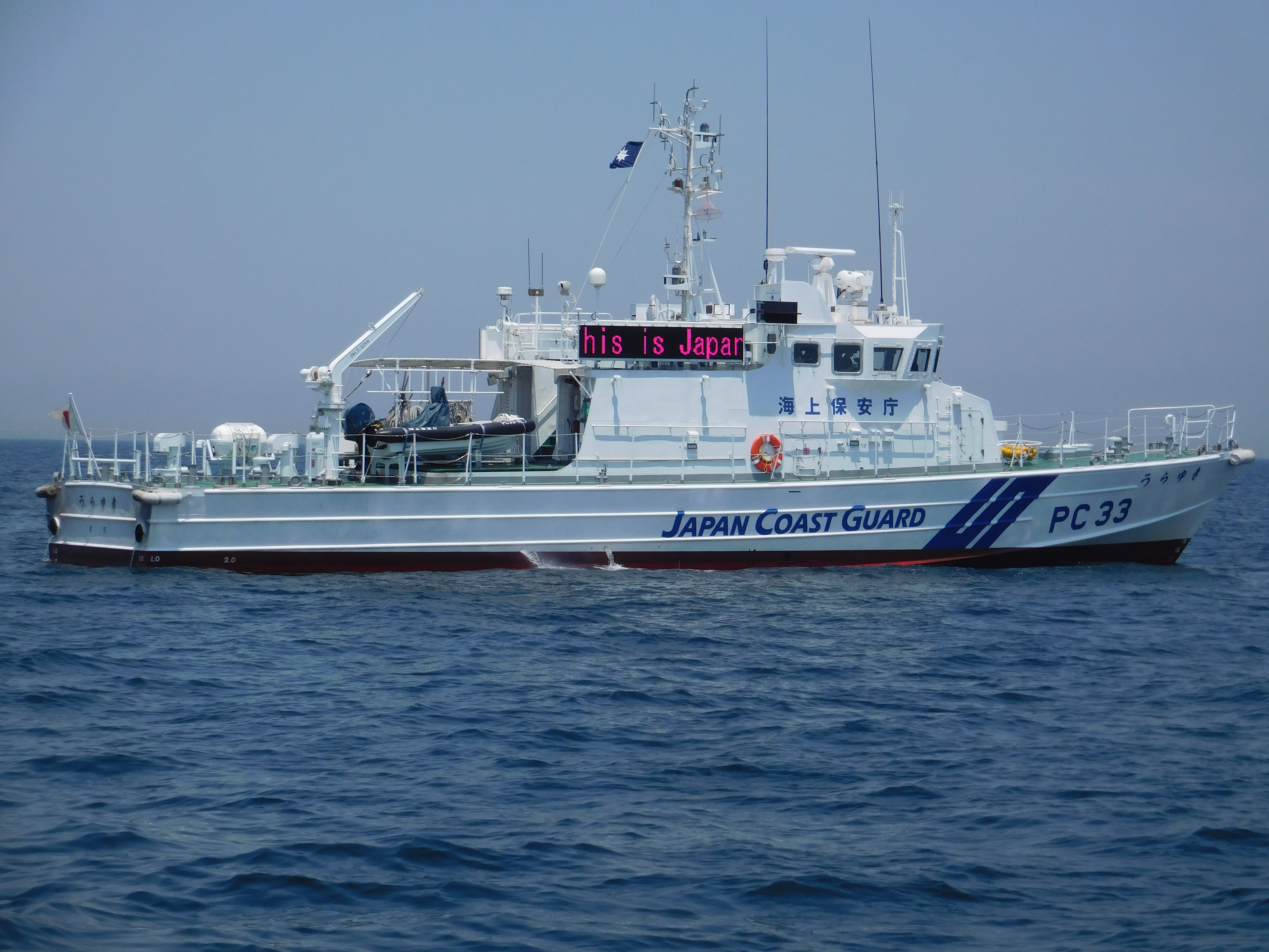 海上保安庁の巡視船うらゆき 横須賀沖ですれ違いました